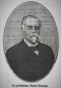 Le Professeur Henri Beaunis - "Paris médical : la semaine du clinicien", 1921, n° 42, J.-B. Baillière et fils